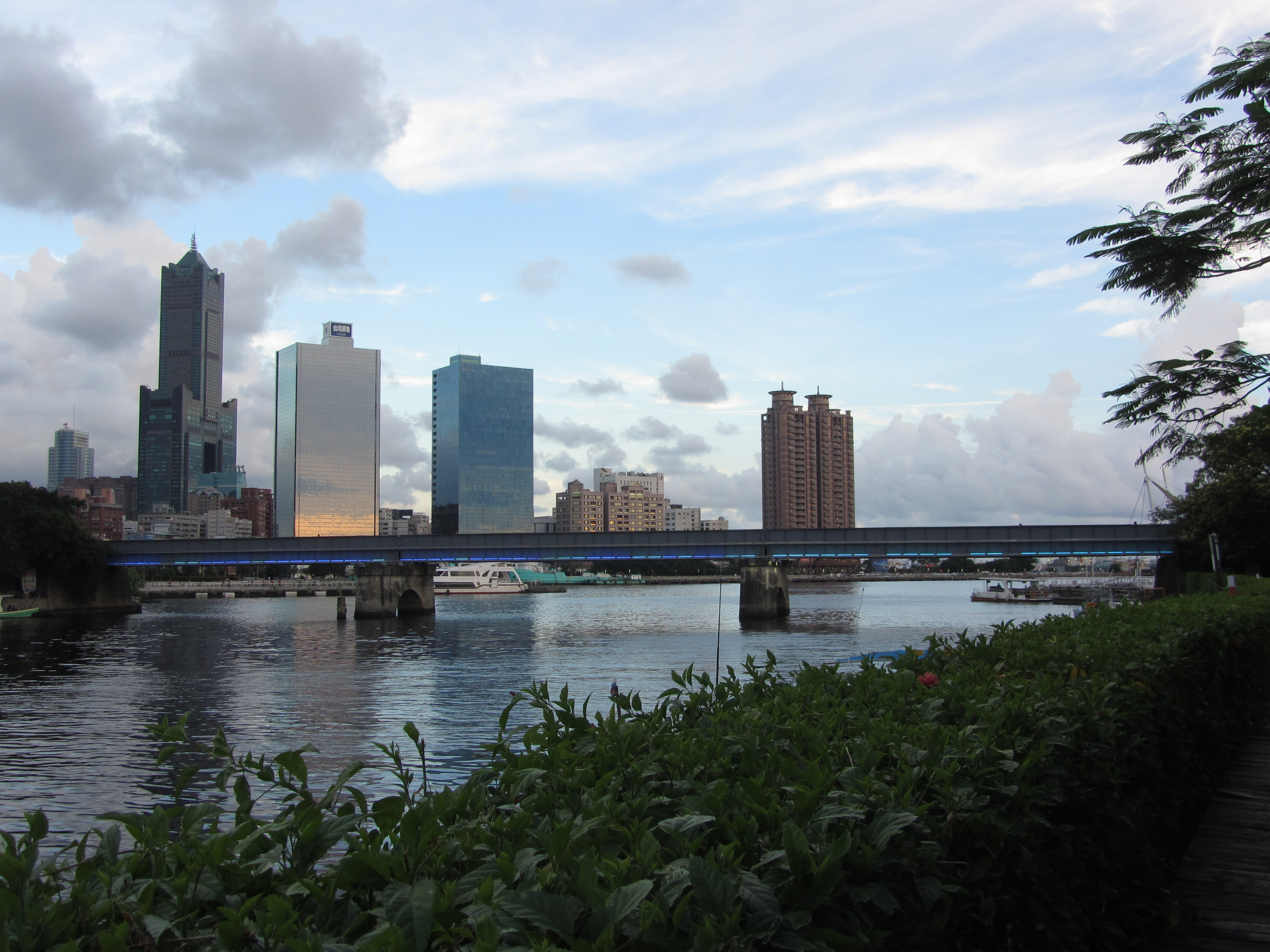 高雄臨港西線跨越愛河的苓雅寮鐵路橋。